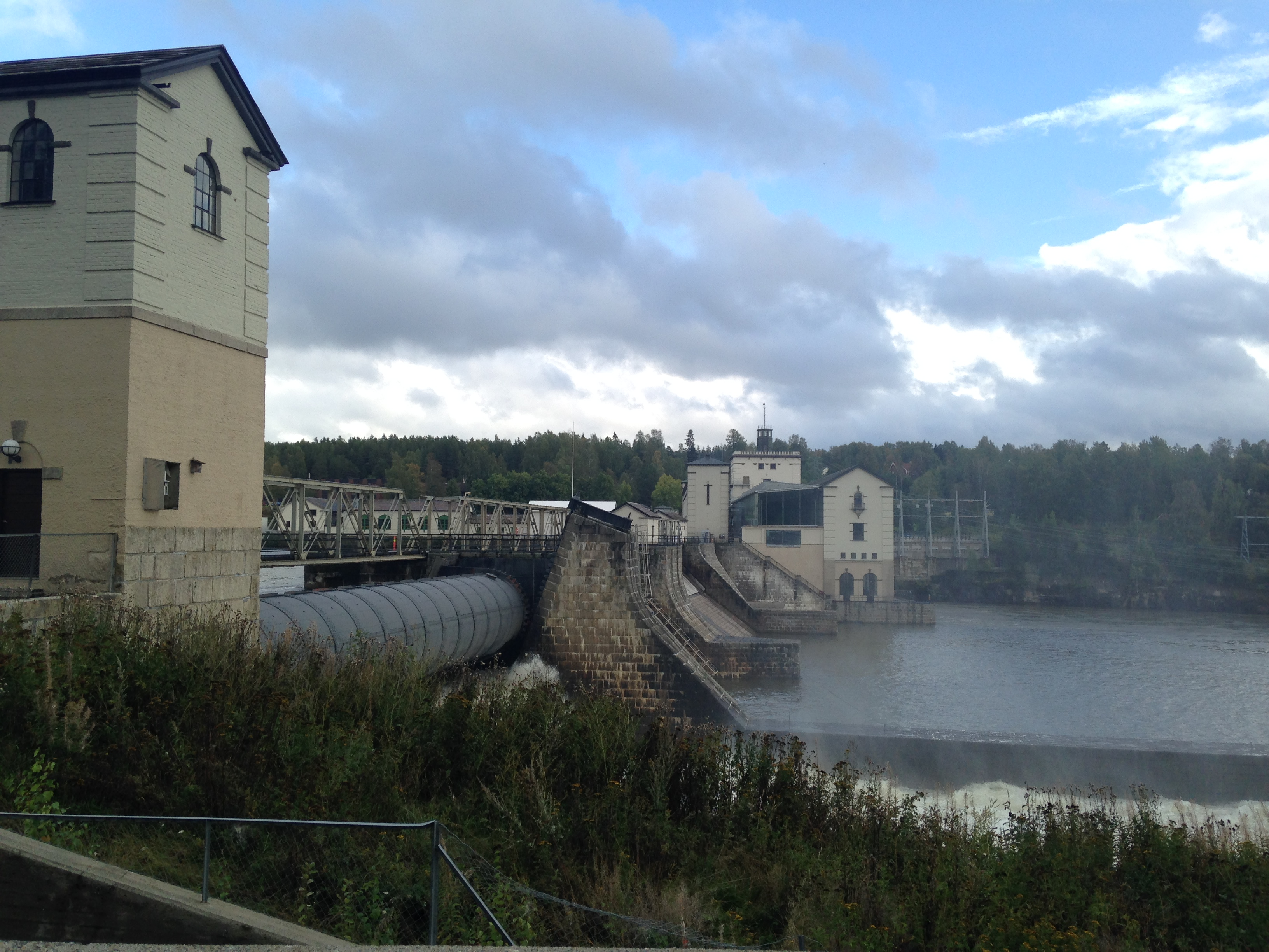 Bilde av Rånåsfoss Kraftverk 1